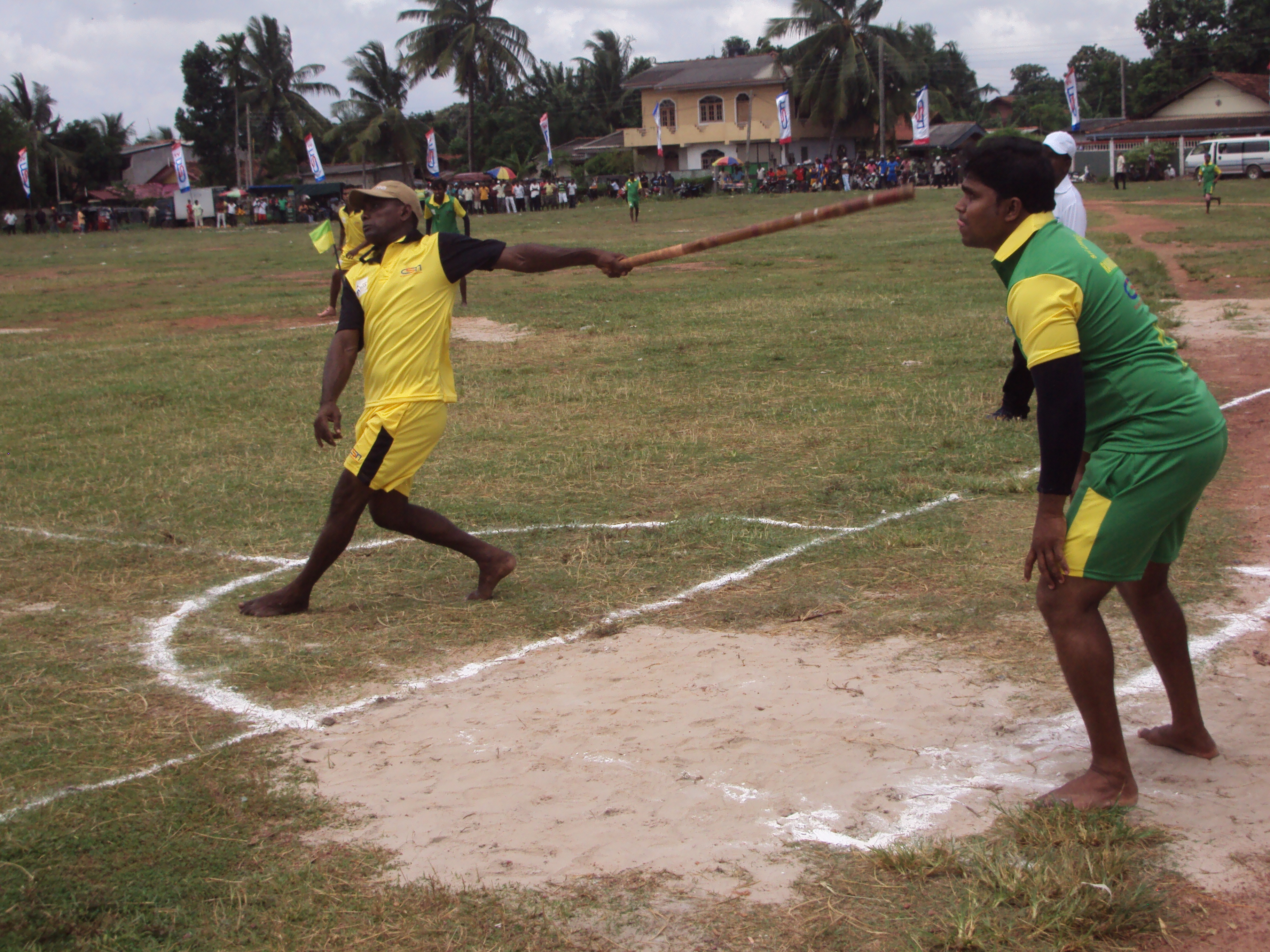 සිංහල: එල්ලේ පන්දුවට පහරදිම